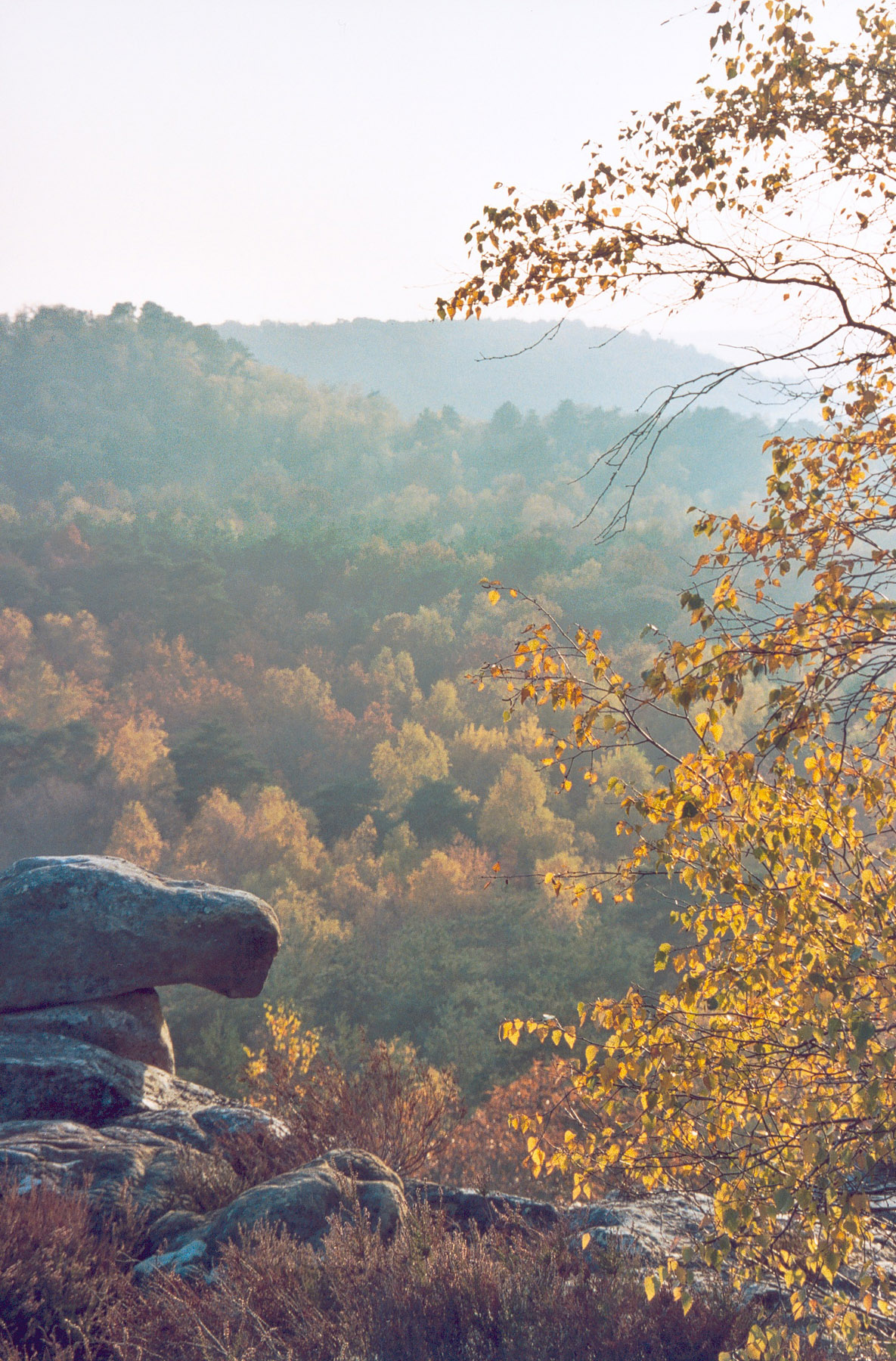 La forêt de Fontainebleau à l'automne Auteur : GIRAUD Patrick